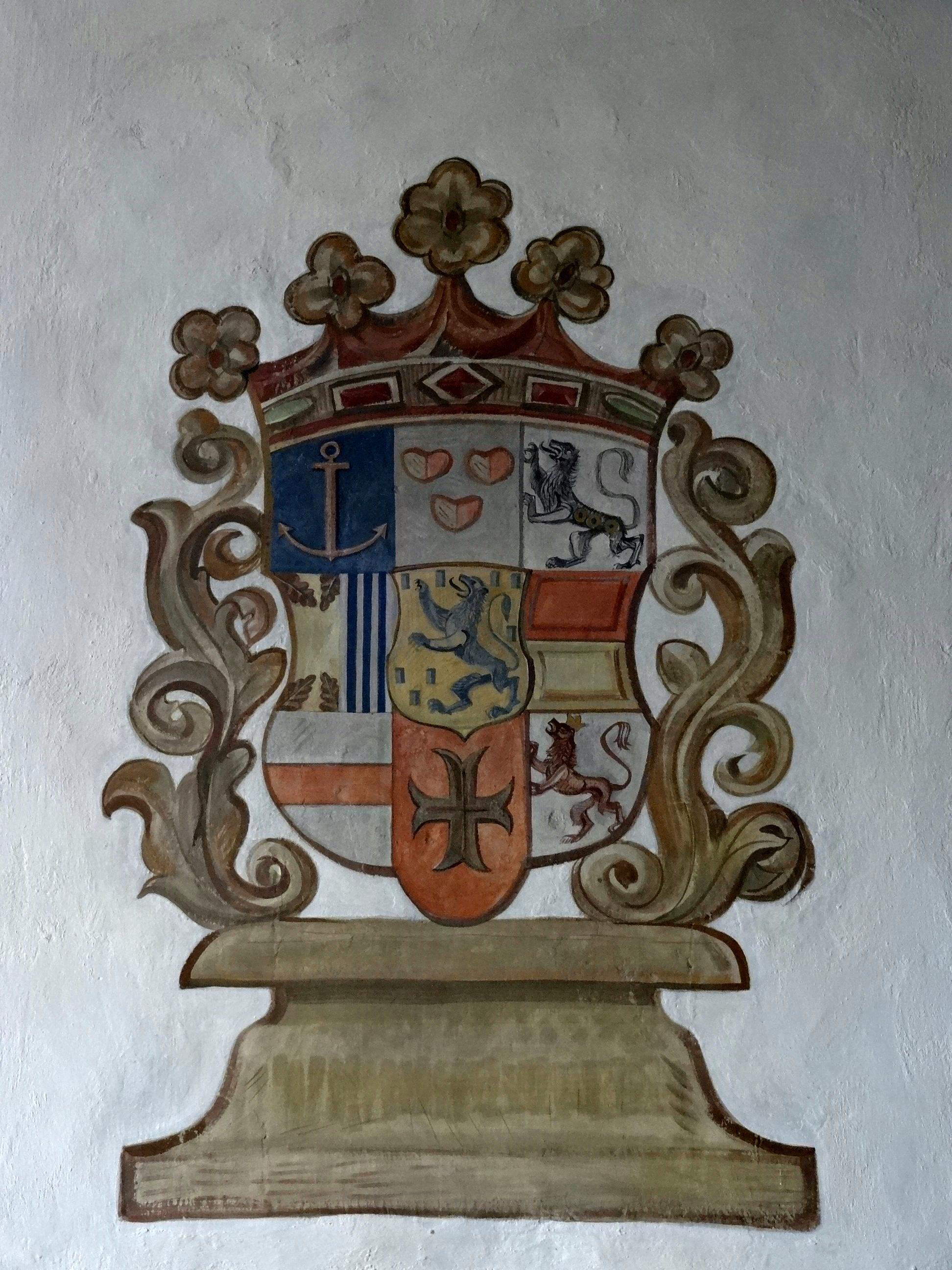 Evangelische Pfarrkirche (Gambach)